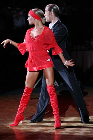 Լատինաամերիկյան պար` չա-չա-չա